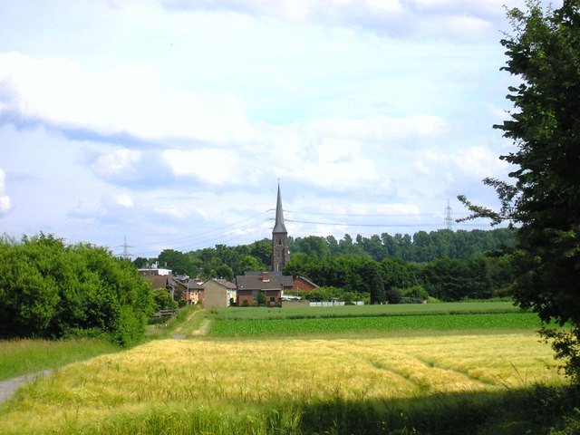 Felder bei Niederaußem (Bergheim), mit Blick auf Oberaußem und den Abtsbusch.